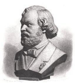 J.B.A. Lassus.